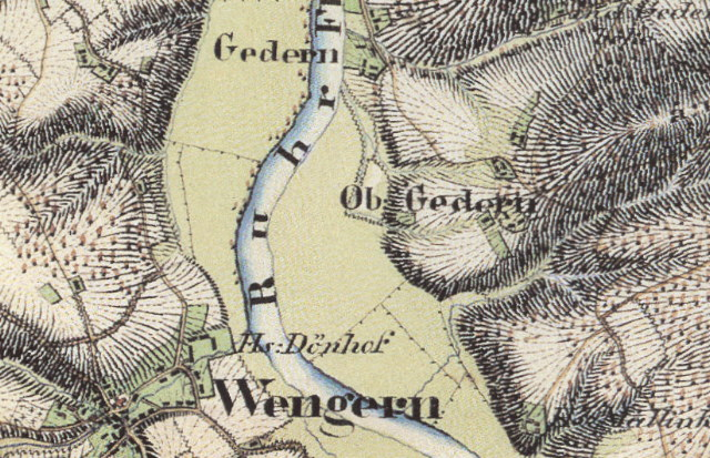 Kartenausschnitt aus der Preußischen Uraufnahme von 1840 mit dem Ruhrtal im Bereich zwischen Wengern und Gedern; Einzeichnung von Hs. Dönhof bei Wengern